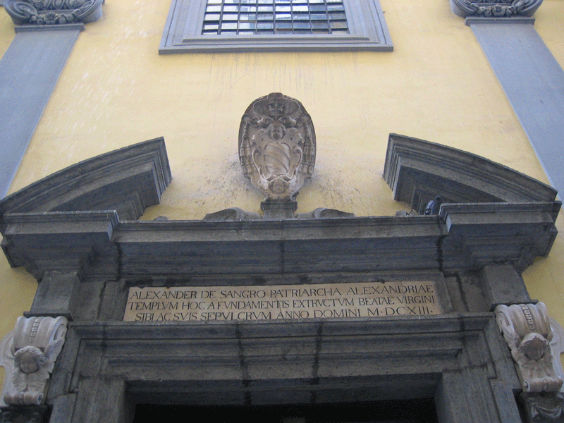 Lapide sull'attuale ingresso della Cappella Sansevero a Napoli.